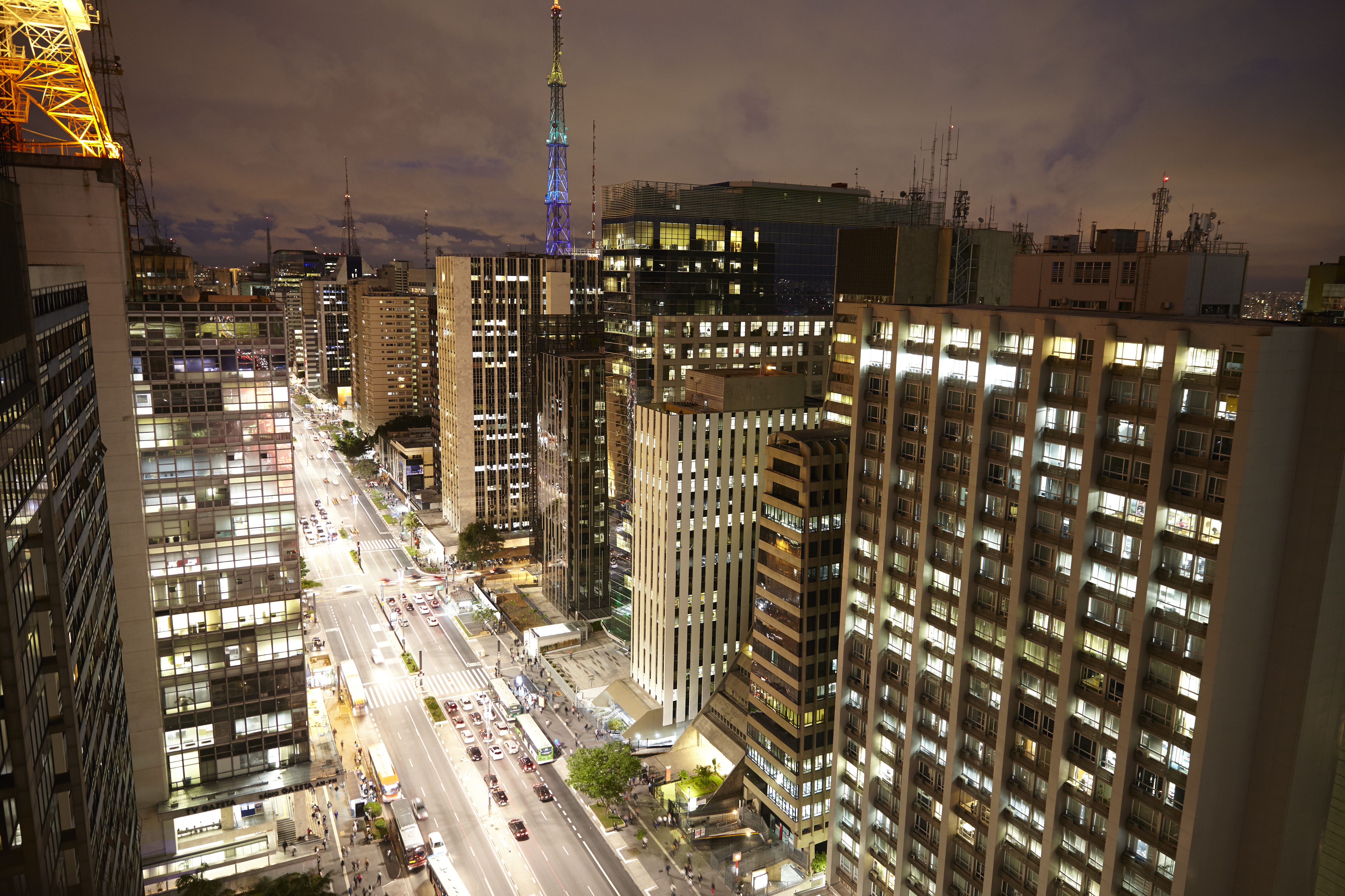 Avenida Paulista, em São Paulo, Brasil.